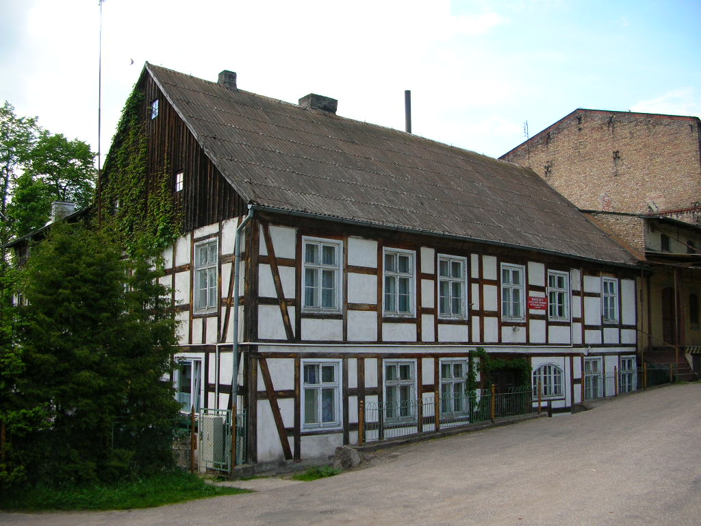 Krajenka - zabytkowy młyn Autor - Bartek Wawraszko